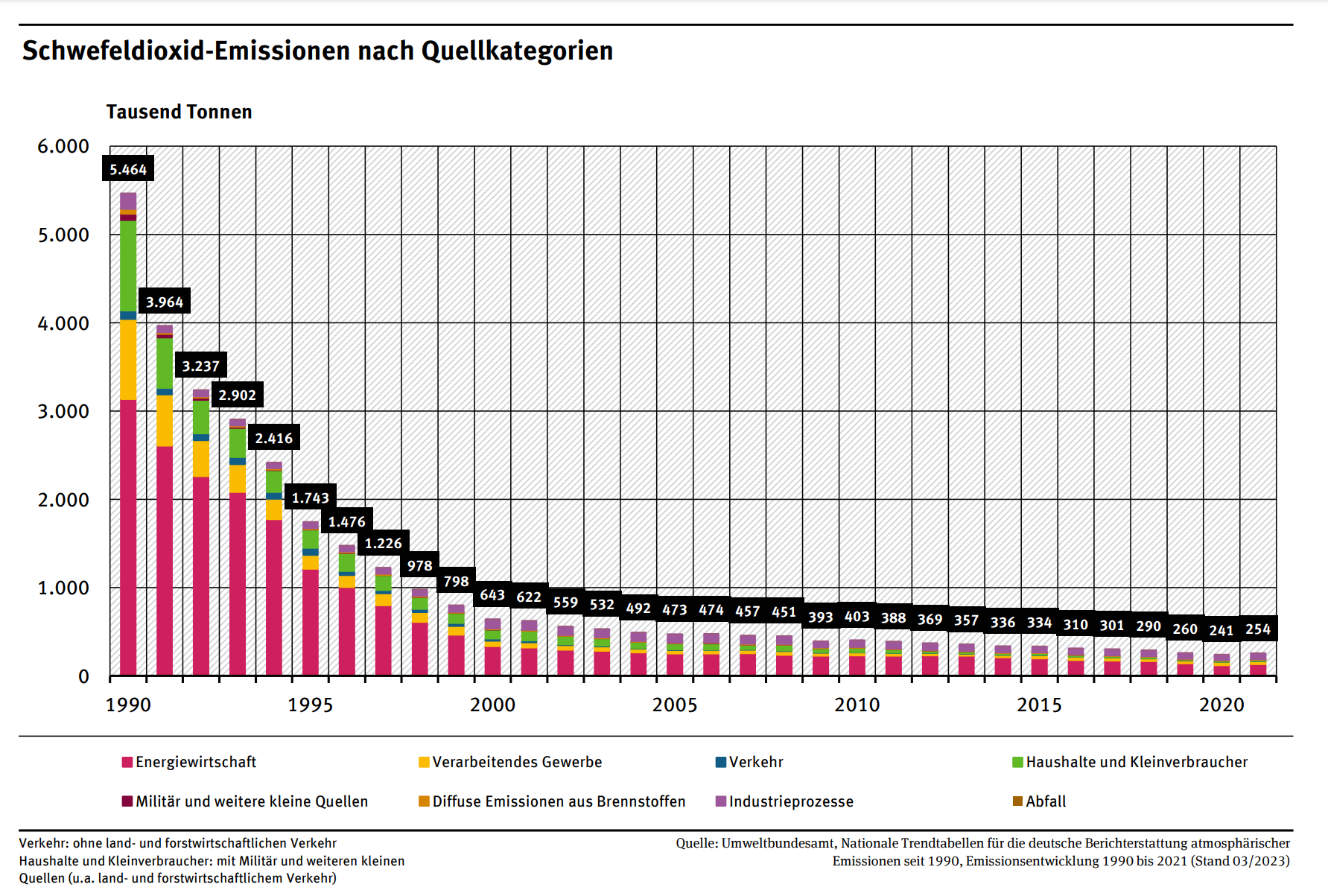 Schwefeldioxid - Emissionen in Deutschland nach Quellkategorien Verkehr: ohne land- und forstwirtschaftlichen Verkehr Haushalte und Kleinverbraucher: mit Militär und weiteren kleinen Quellen (u.a. land- und forstwirtschaftlichem Verkehr)